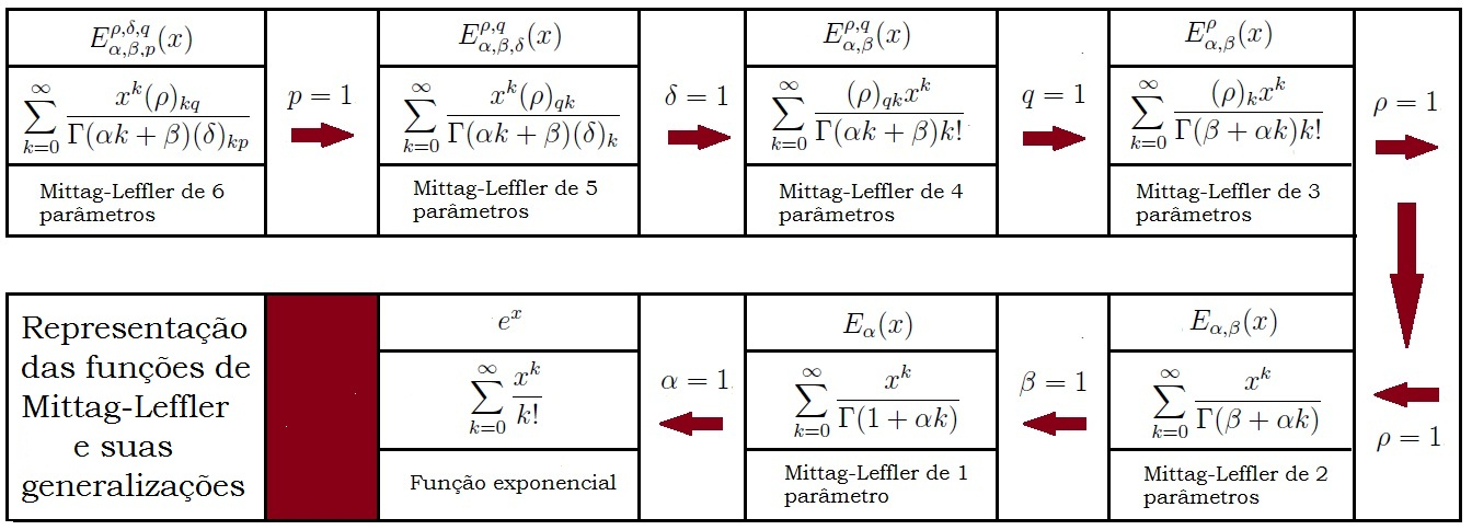 Representação das Funções de Mittag-Leffler